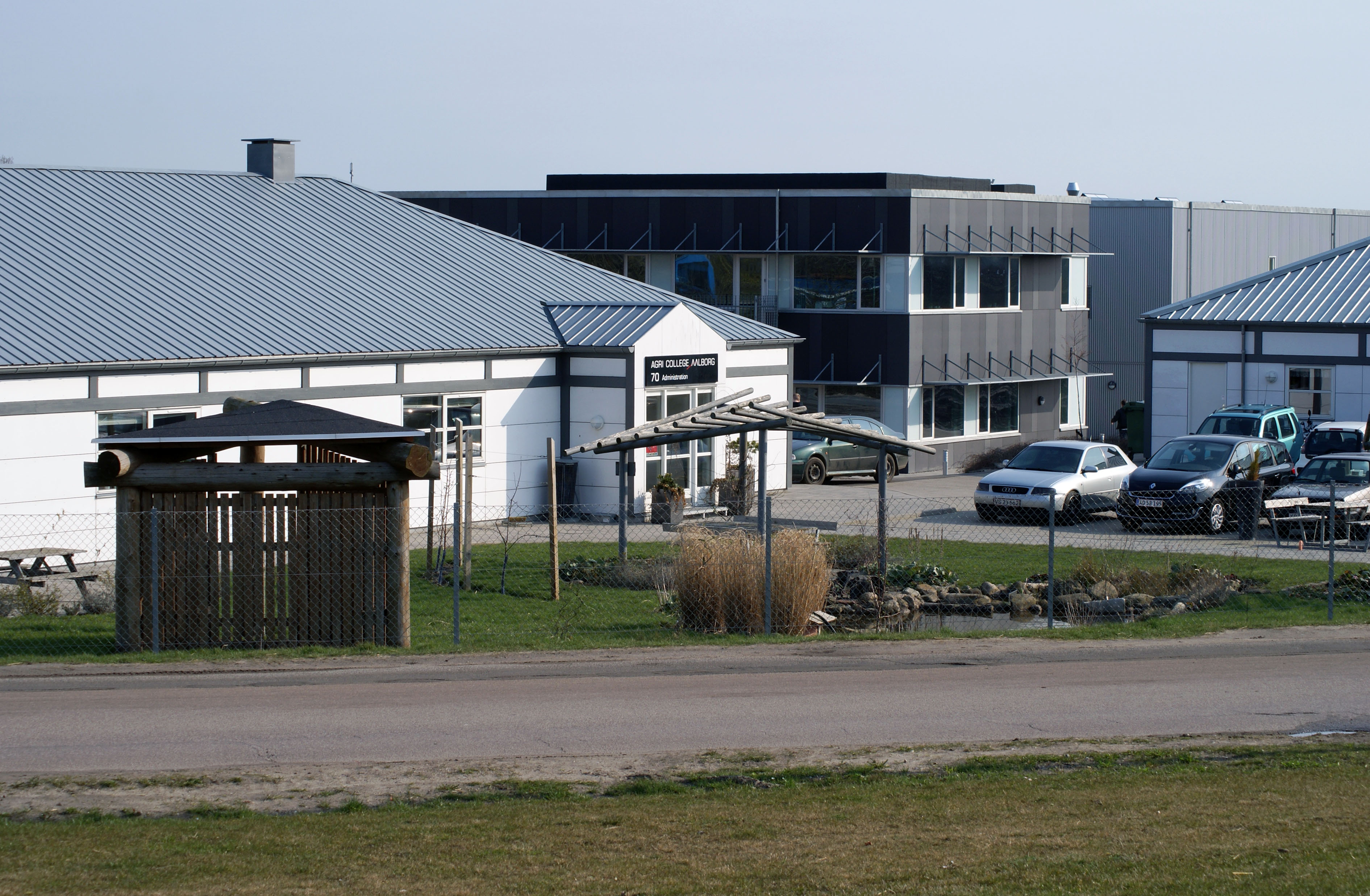 En del af tech college aalborg